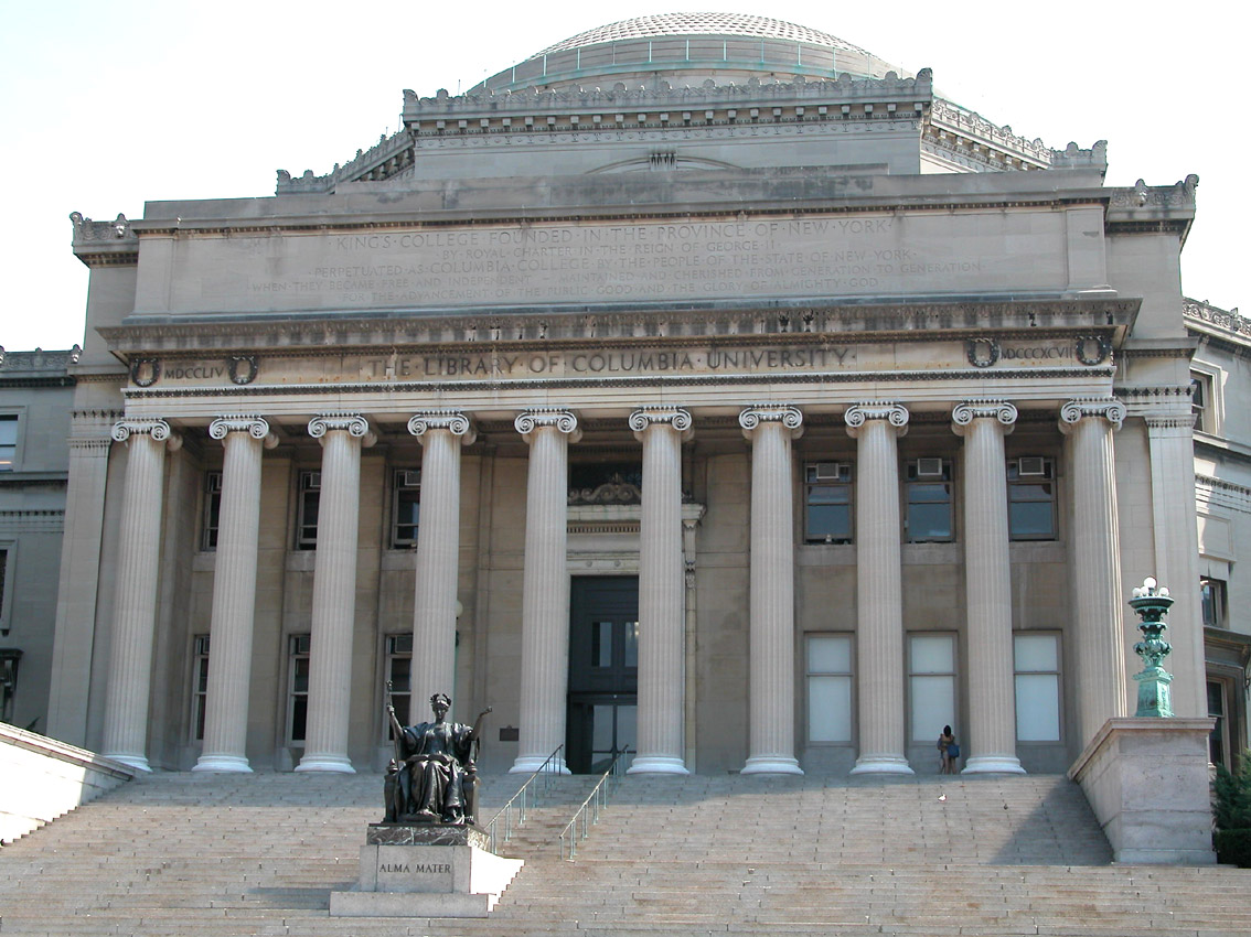 Columbia University